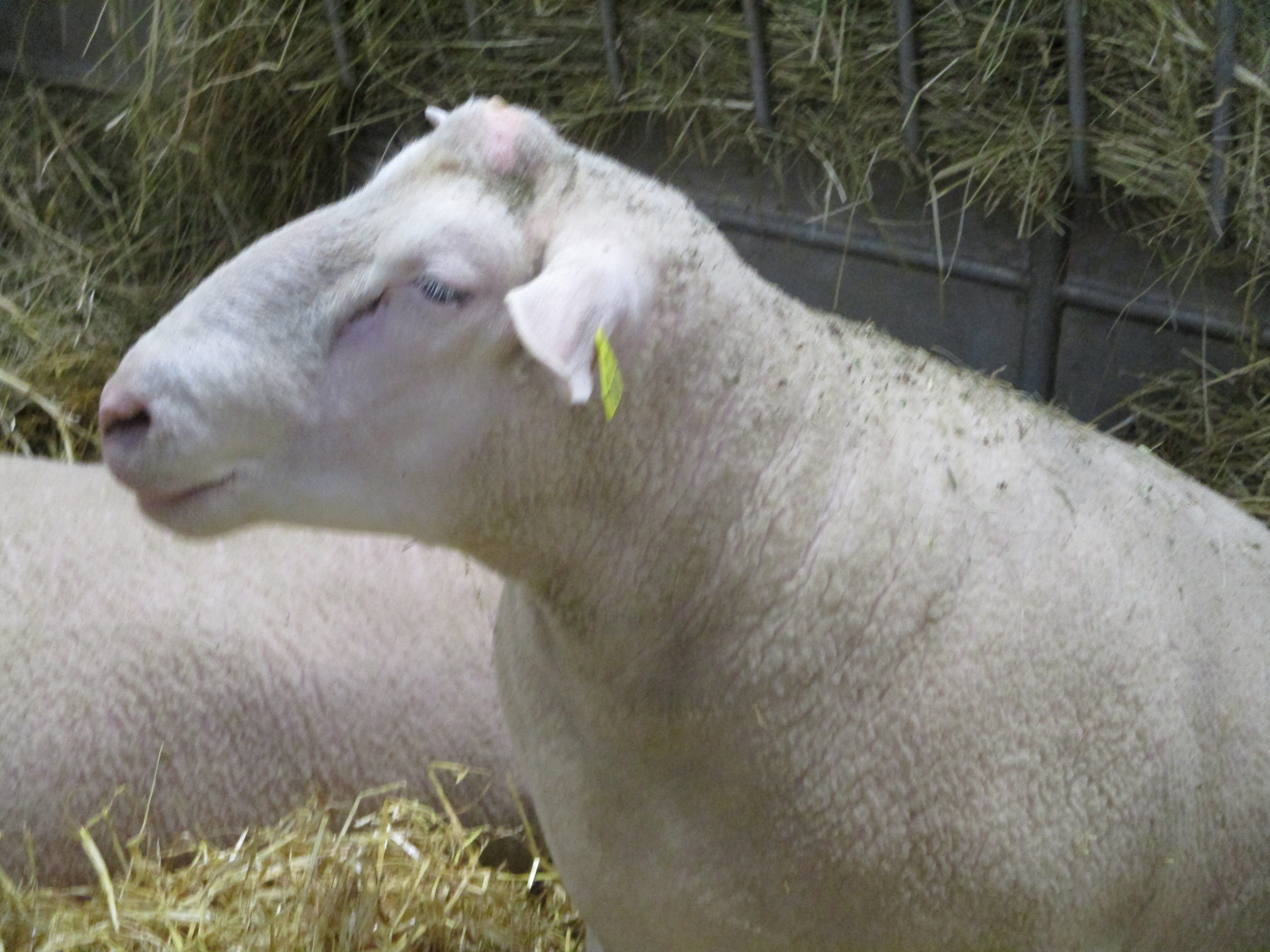 Mouton berrichon du Cher au Salon international de l'agriculture 2019.